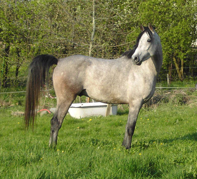 Shagya Araber KS Kronjuwel